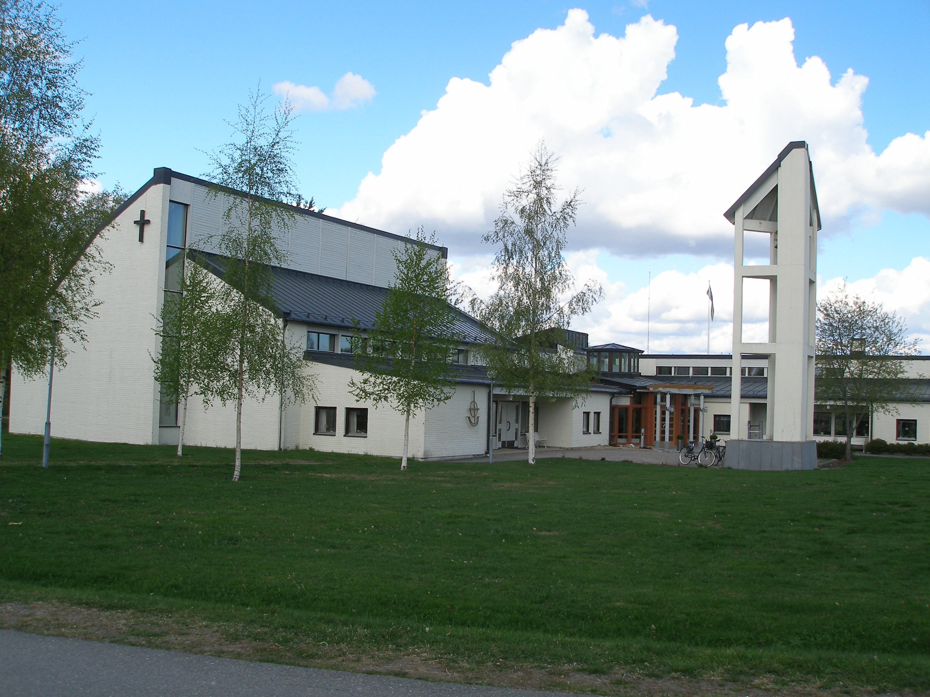 Anderstorps kyrka, Skellefteå landsförsamling, Luleå stift.